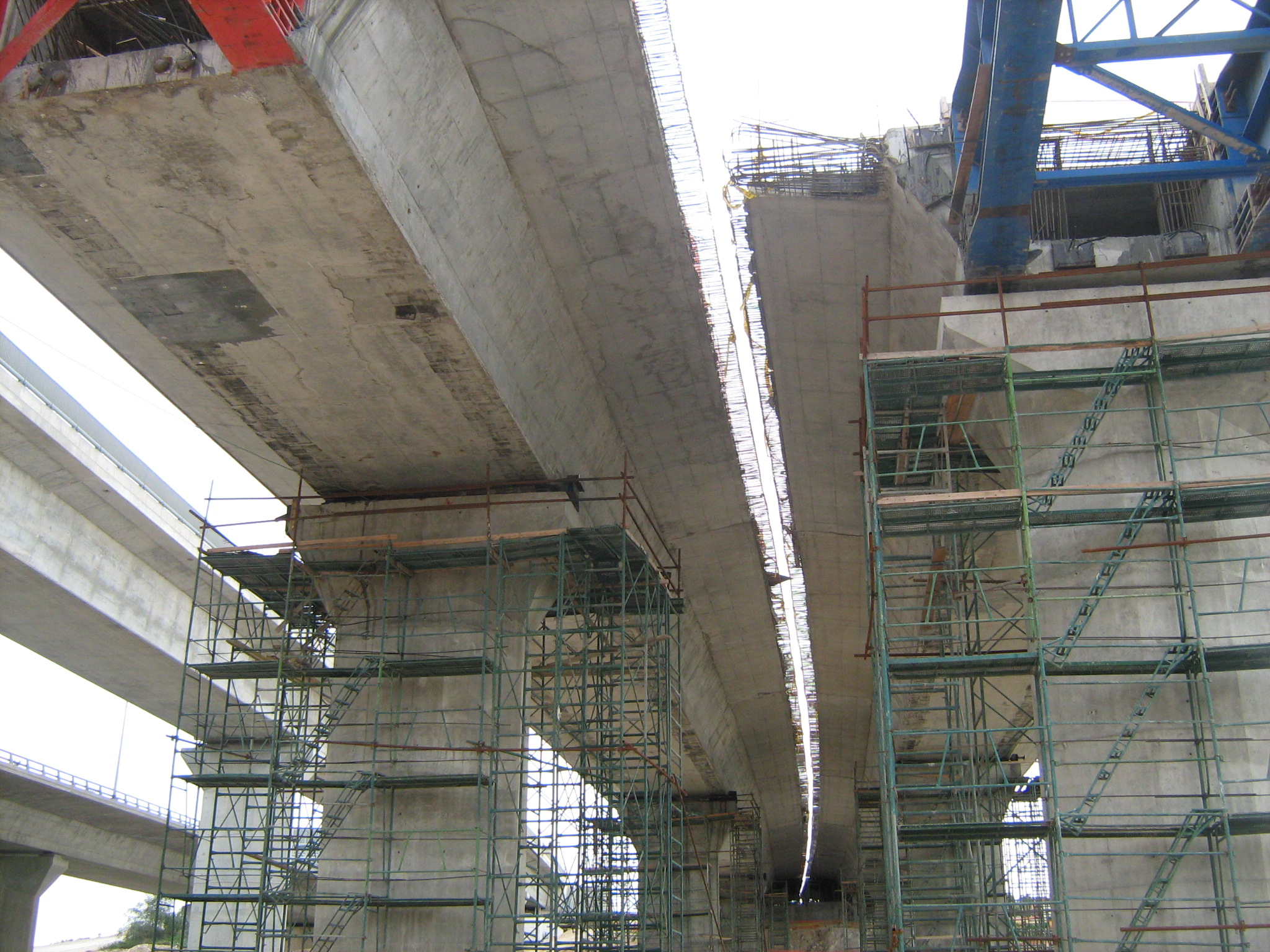 גשרי כביש 431 והרכבת למודיעין מעל נחל ענבה